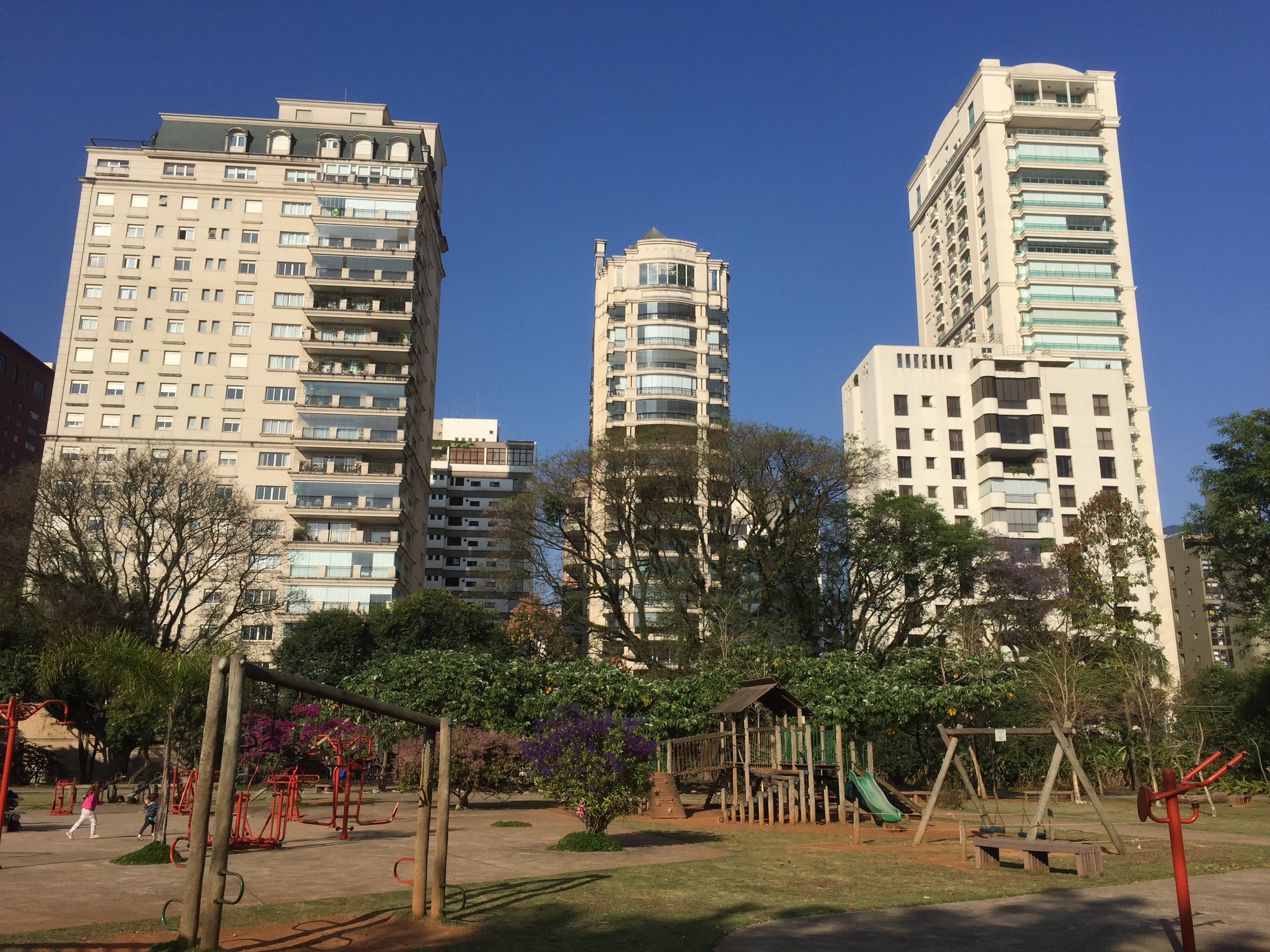 Visão panorâmica de espaço infantil com prédios ao fundo no recinto